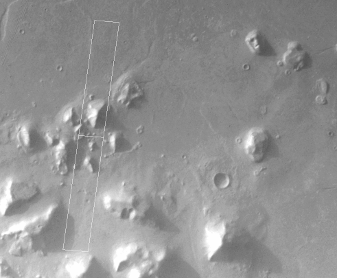 Imagem de satélite missão Viking. Imagem de um rosto na superfície de Marte.